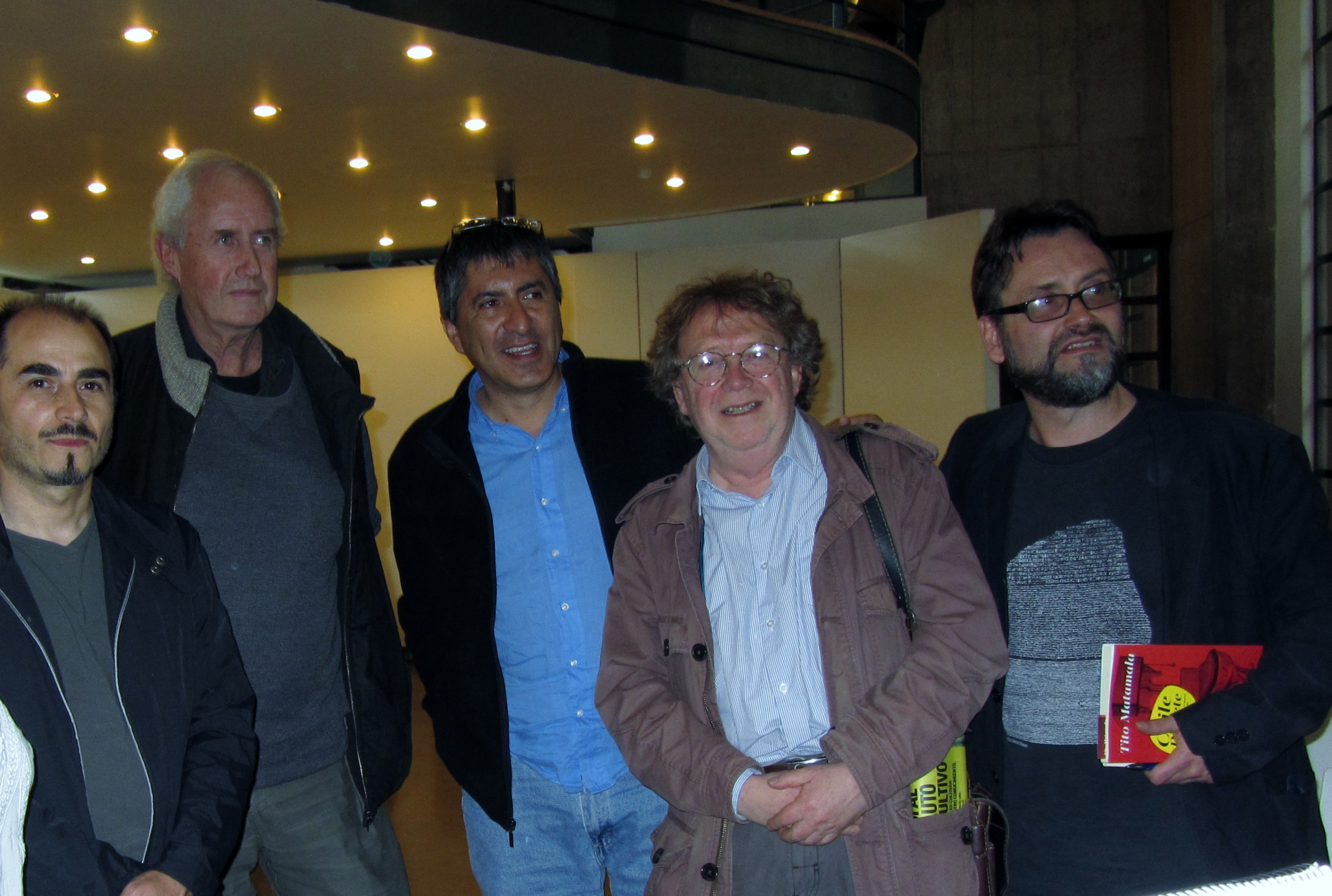 Los escritores chilenos Julio Núñez, Juan Pablo Uribe-Etxeverría, Marcelo Rioseco, Juan Cameron y Carlos Tromben en la Feria Internacional del Libro de Santiago 2015